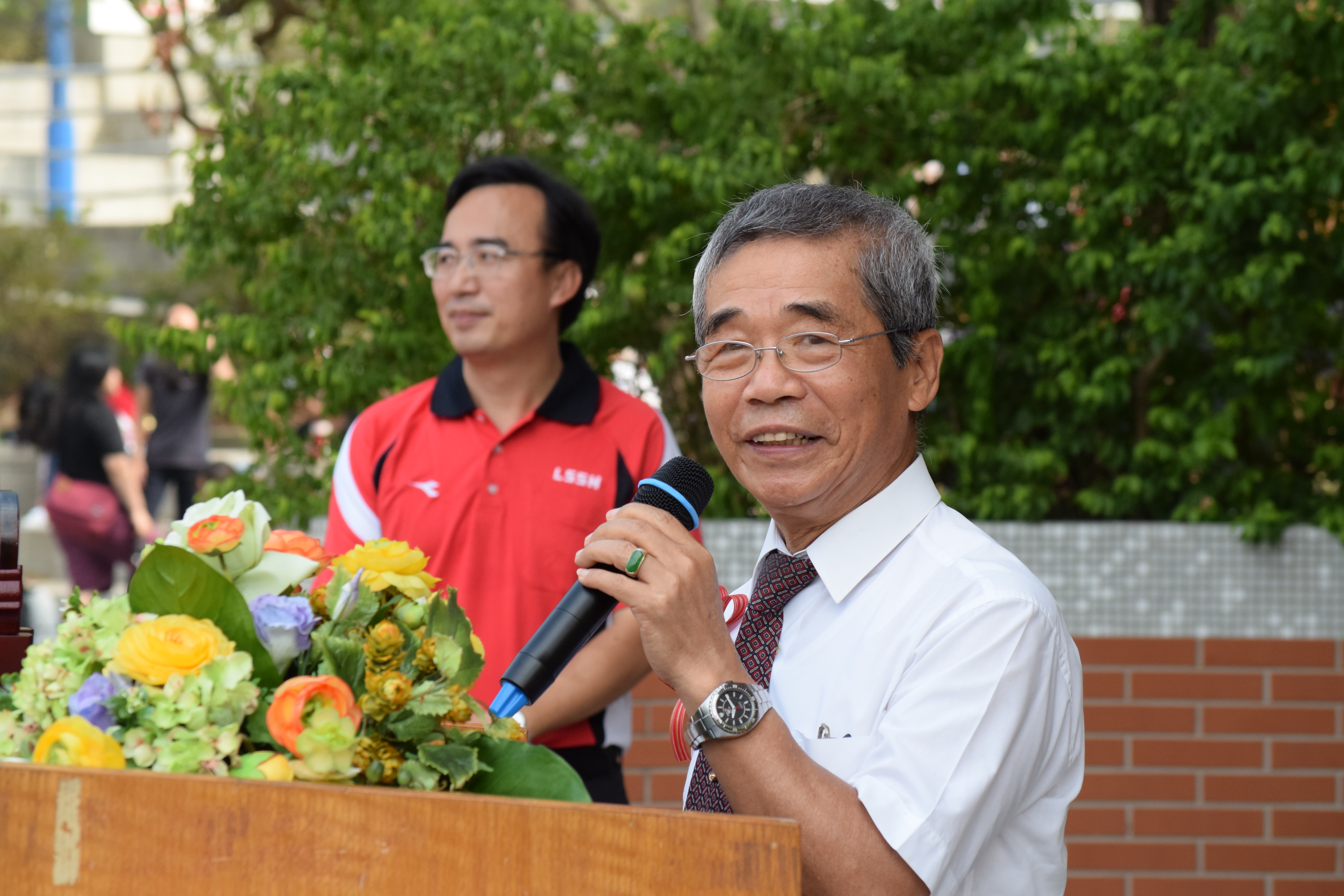 創校校長鄭顯三返校參加麗山高中第16屆校慶